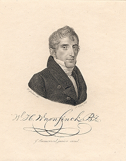 Willem Hendrik Warnsinck, dutch poet